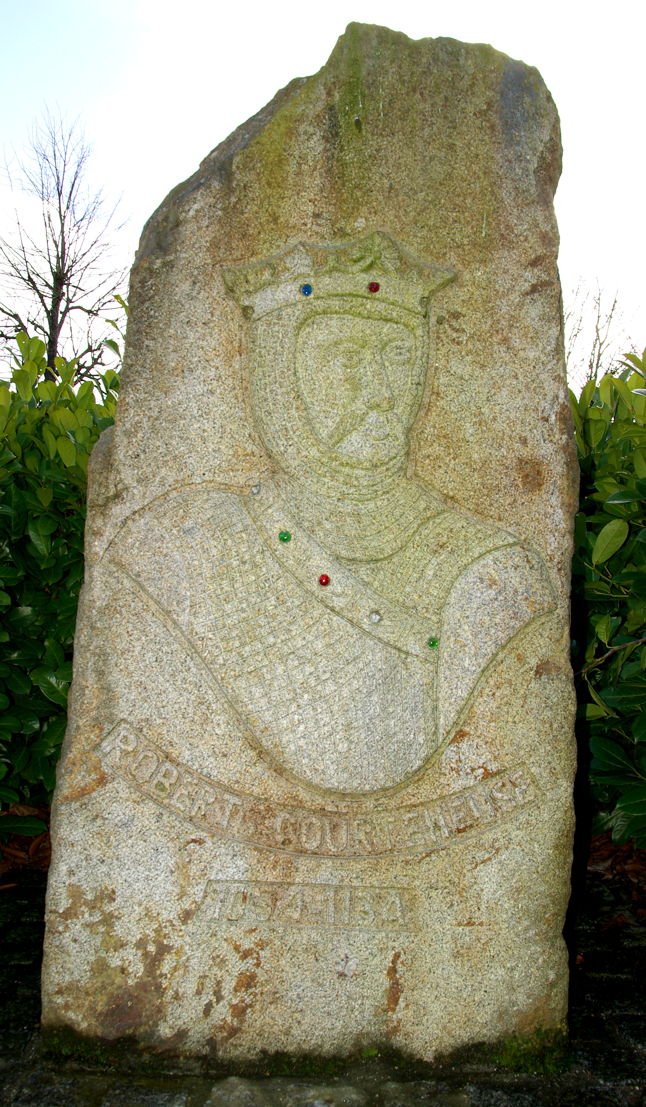 La stèle représentant Robert Courteheuse (1054-1134) Duc de Normandie, au champ Henriet (champ de foire) à Tinchebray.